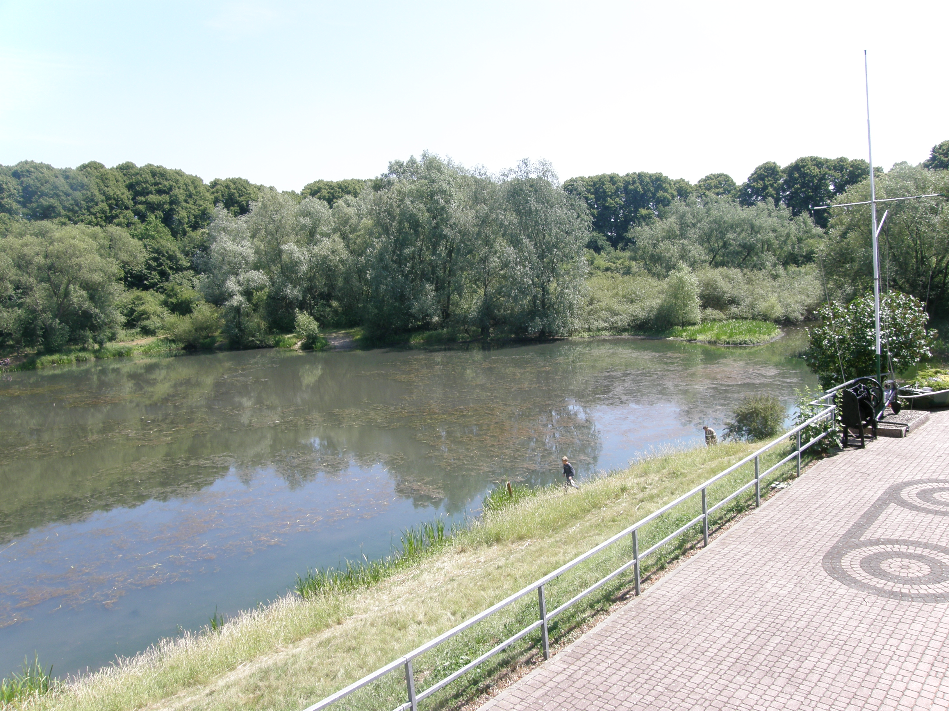 Der ehemalige Lippehafen bei Wesel, südliches Ende; Südteil des alten Hafenbeckens und Waldstrukturen im Hintergrund im Naturschutzgebiet „Lippeaue“ (NSG WES-092)